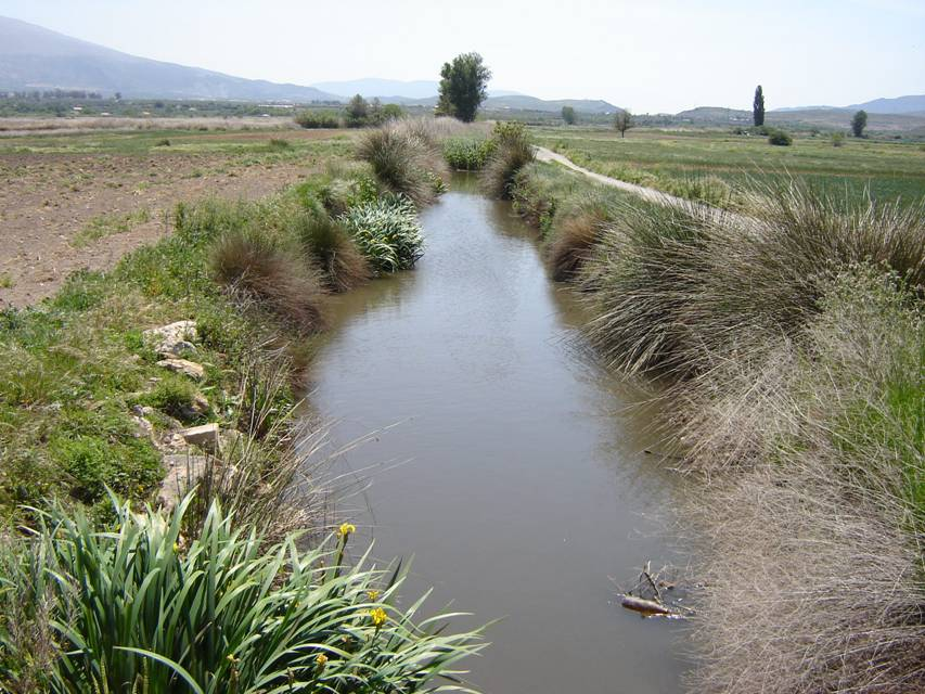 Canal de drenaje de la laguna de El Padul (Granada, España), también llamado Madre.